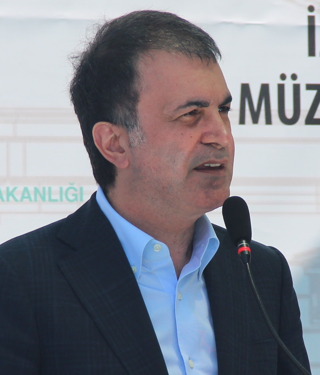 Ömer Çelik, a Turkish minister